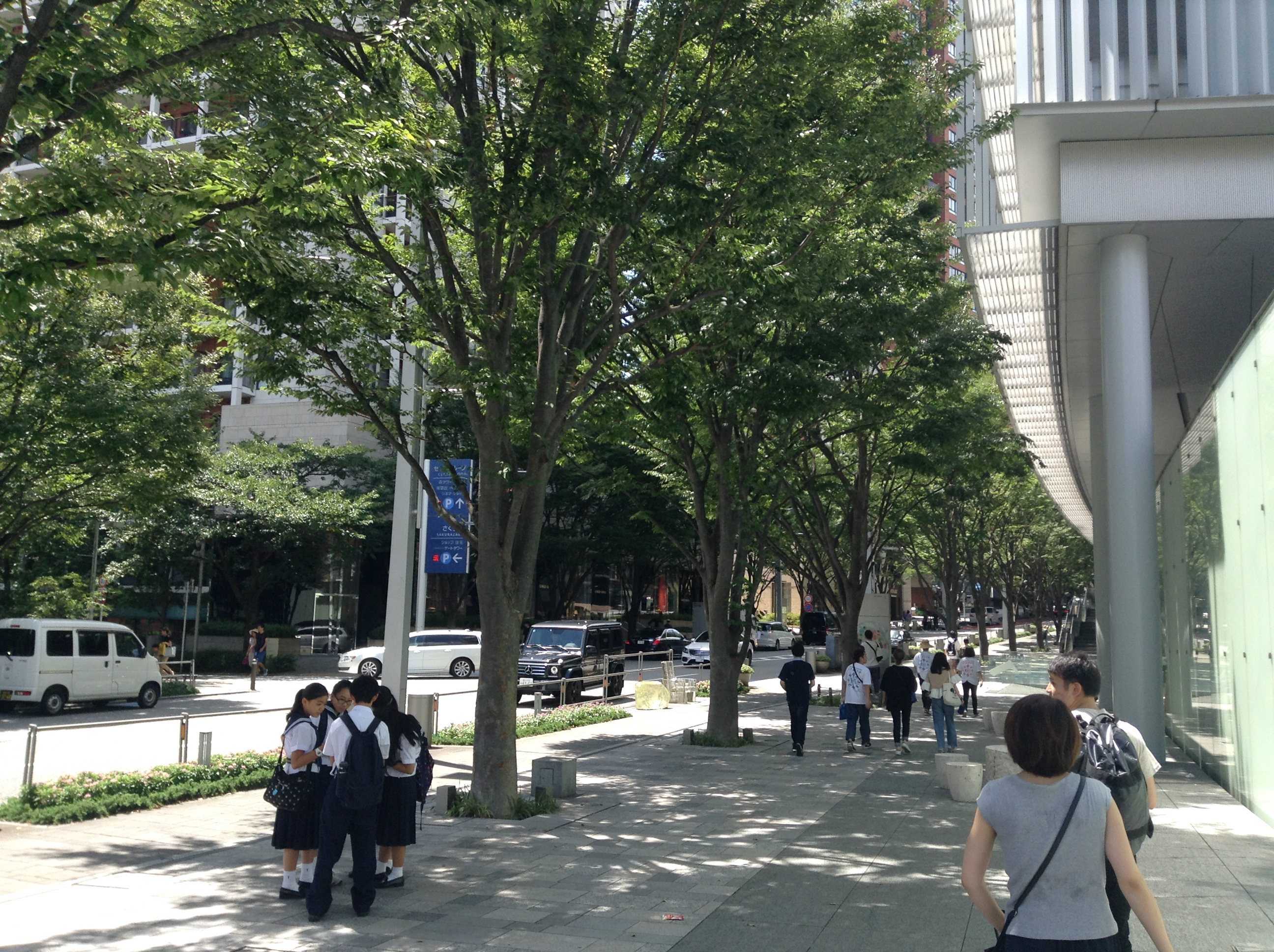 走り出す瞬間ジャケット撮影地